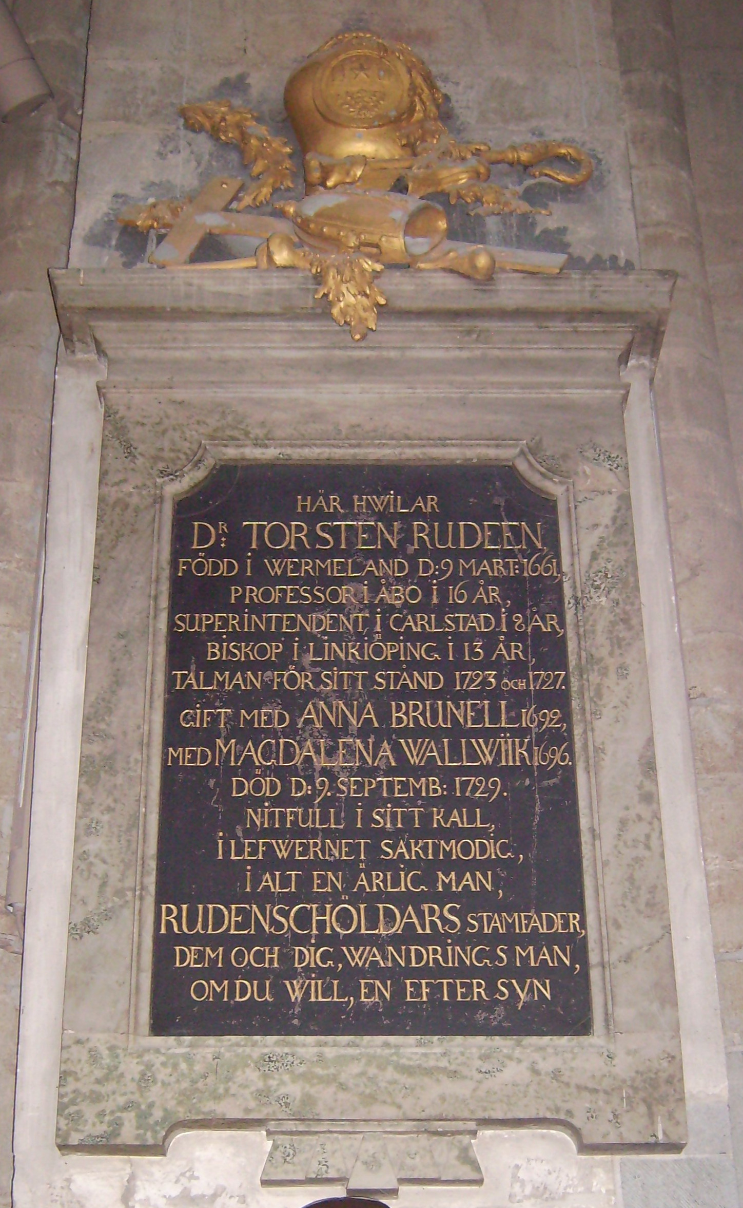 Minnestavla över biskopen Torsten Rudeen, Linköpings domkyrka.